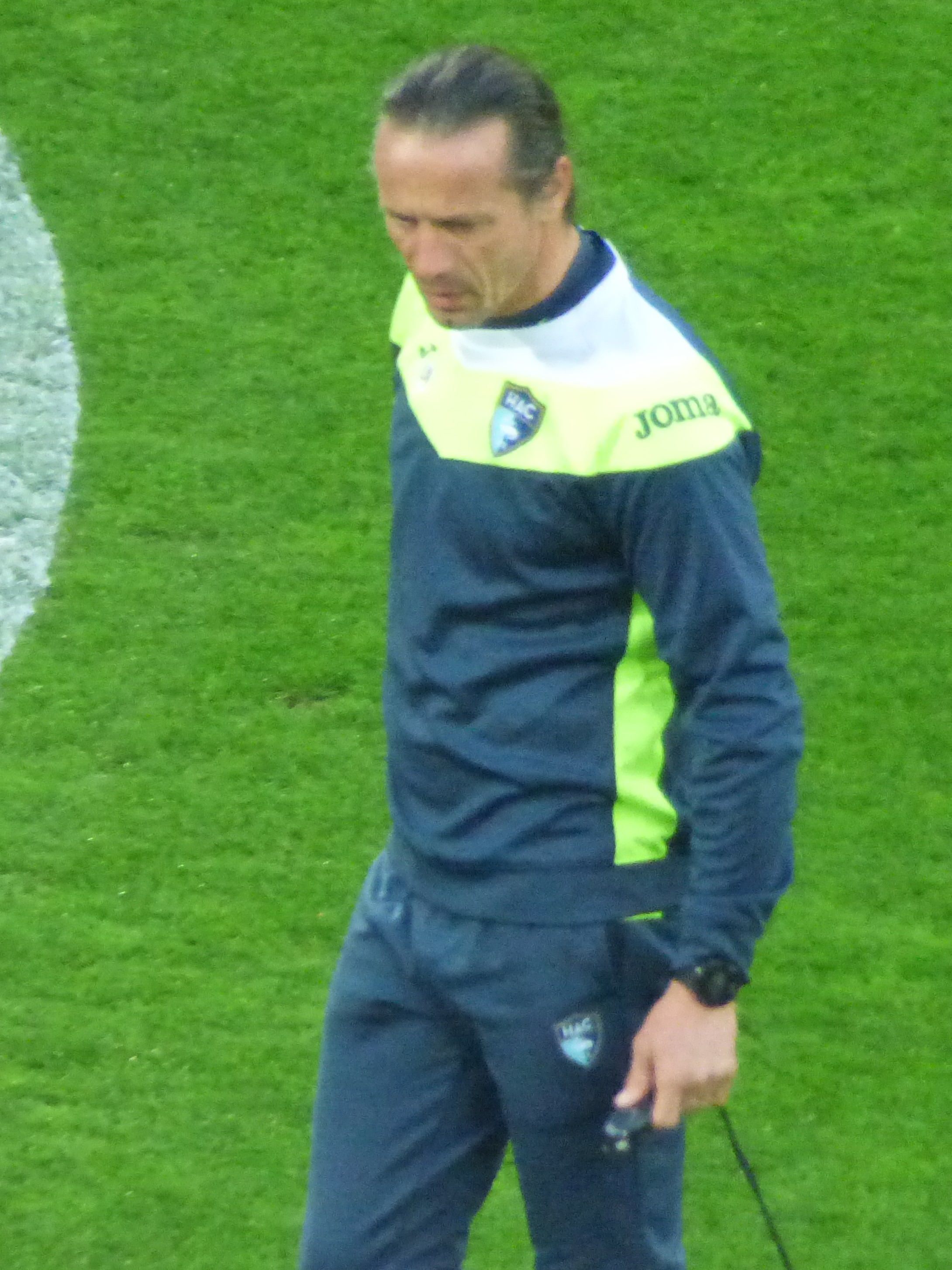 Lilian Nalis avant le match Lens / Le Havre, comptant pour la 30ème journée du championnat de France de Ligue 2 2018-2019, le 1er avril 2019 au Stade Bollaert-Delelis.